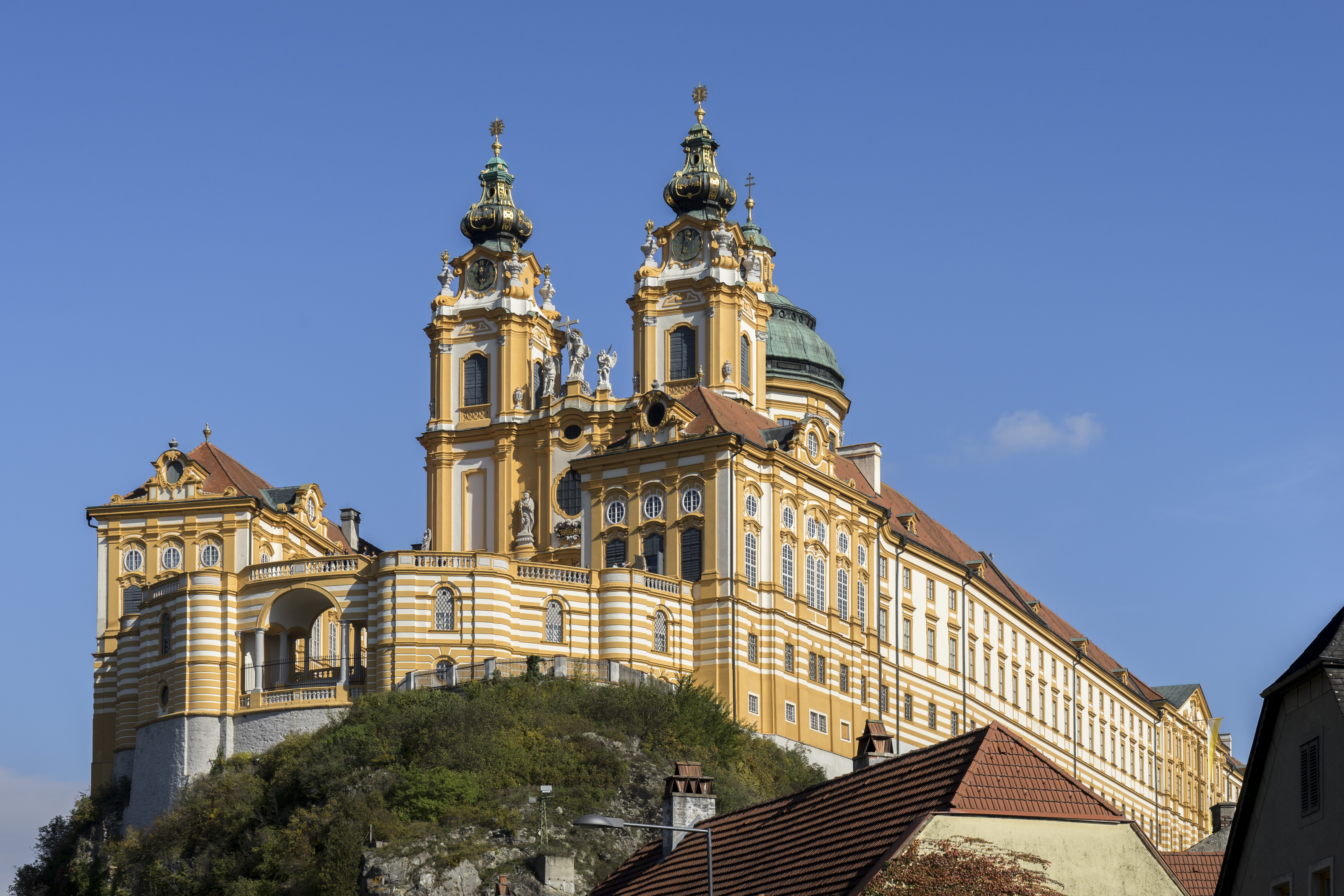 Stift Melk, Ansicht von Westen von der Bundesstraße 1, bzw. dem Melk-Fluss